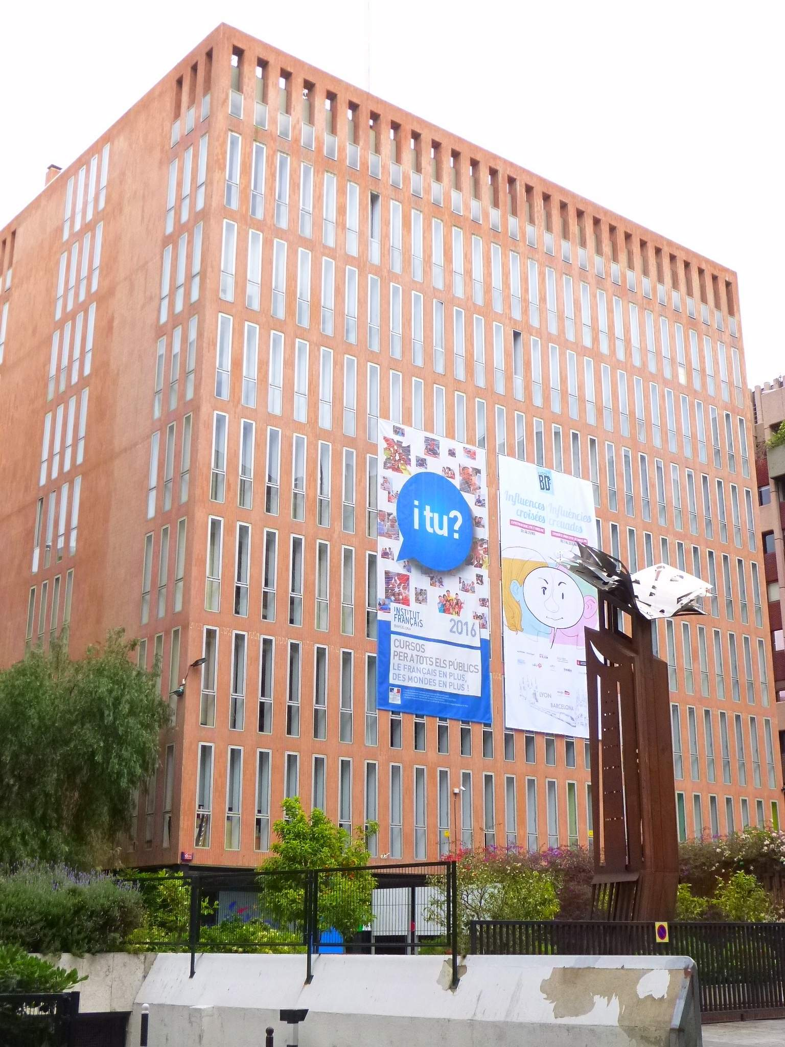 Barcelona - Institut Français Barcelone